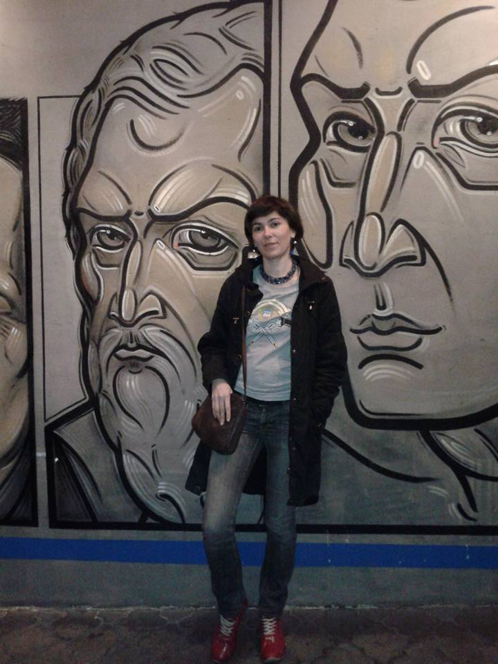 драматургиня